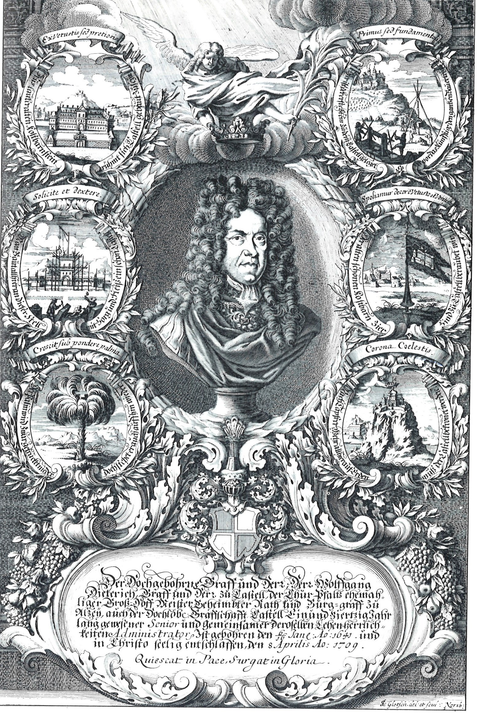 Titelkupfer der Leichenpredigt auf Graf Wolfgang Dietrich zu Castell. Ludwig Christoph Glotsch 1709, Nürnberg.